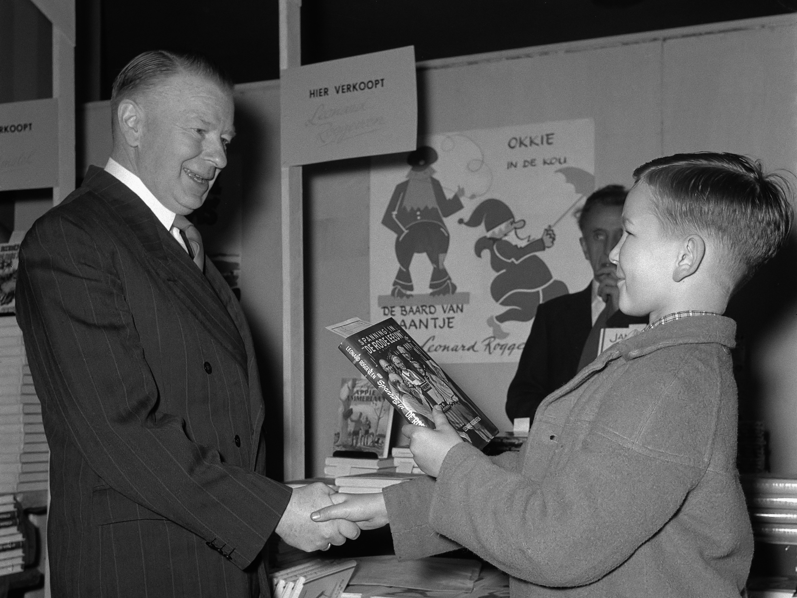 Leonard Roggeveen 8 april 1957